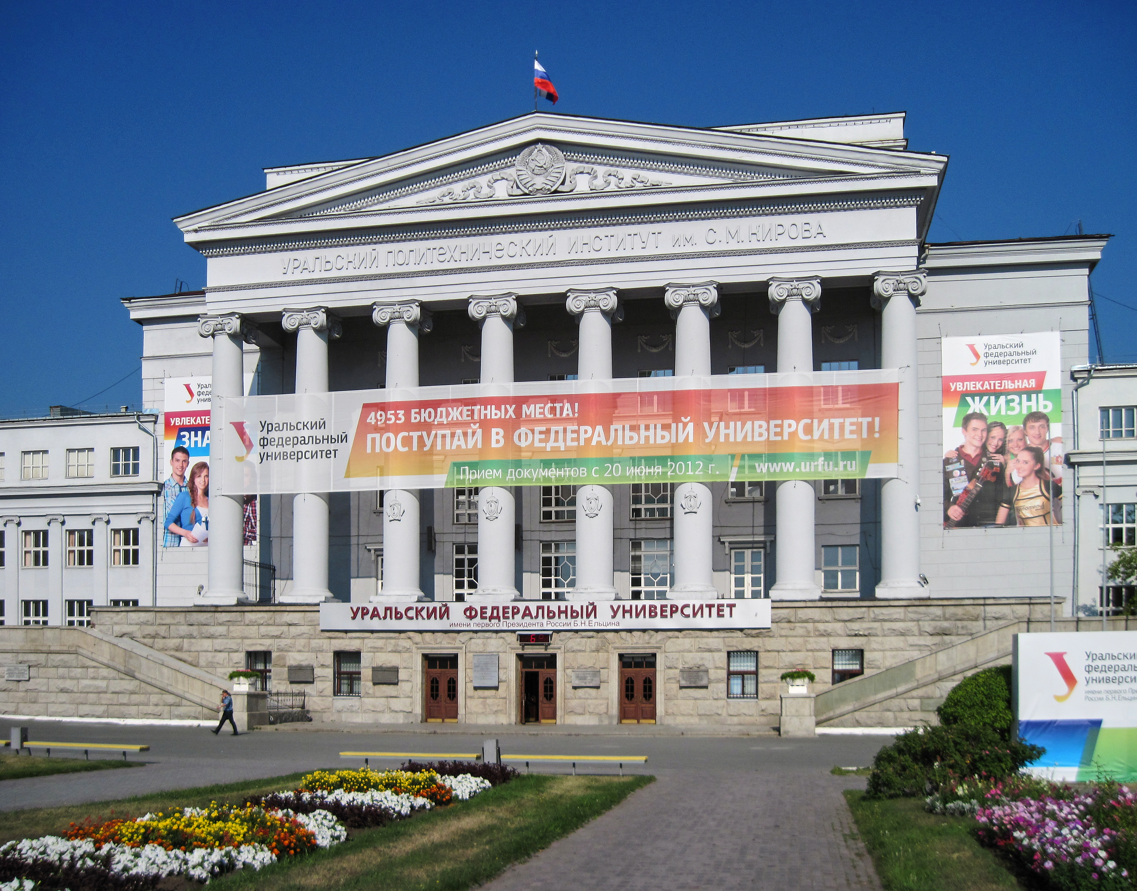 Главный корпус УрФУ